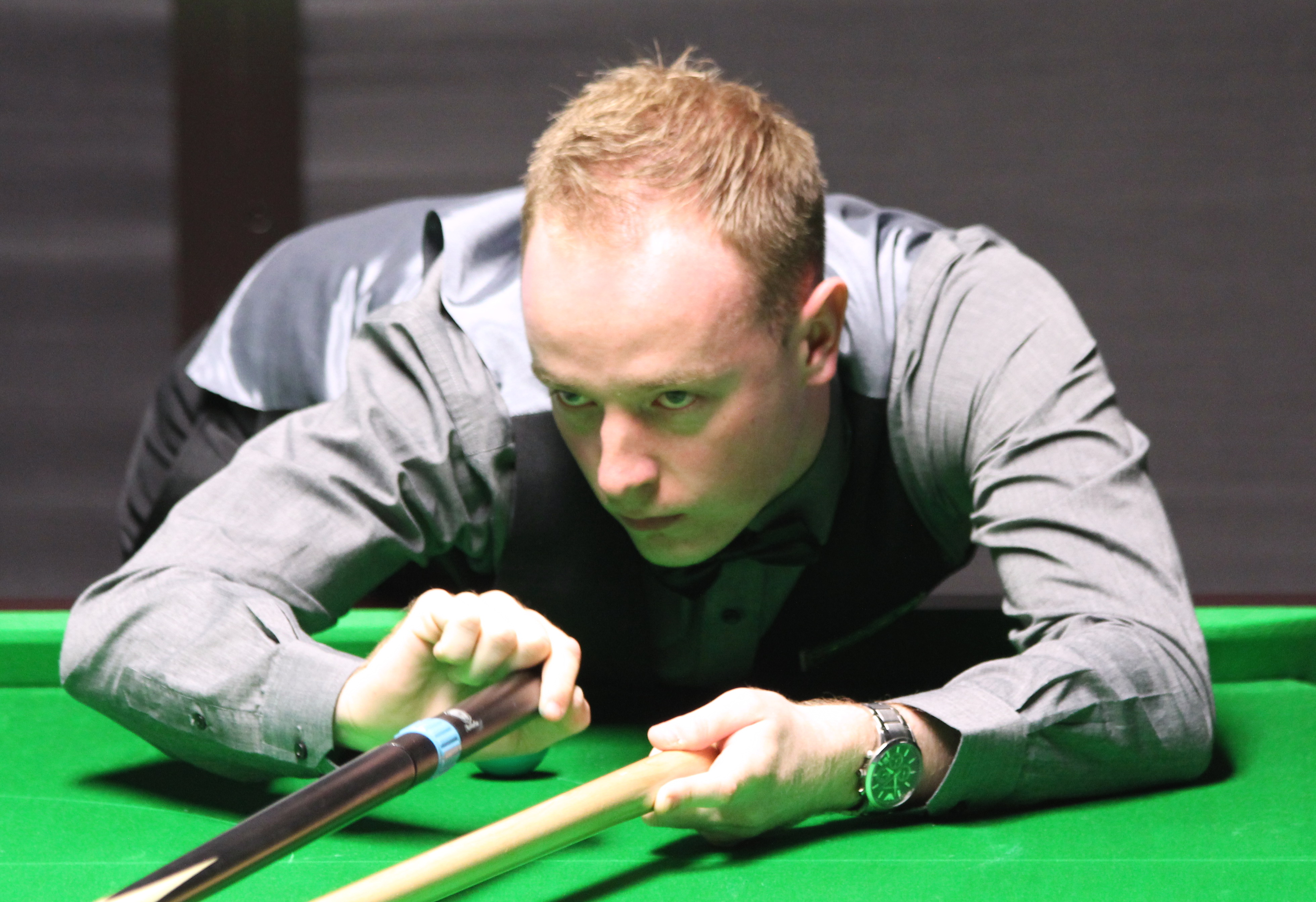 Chris Wakelin beim Paul Hunter Classic 2016